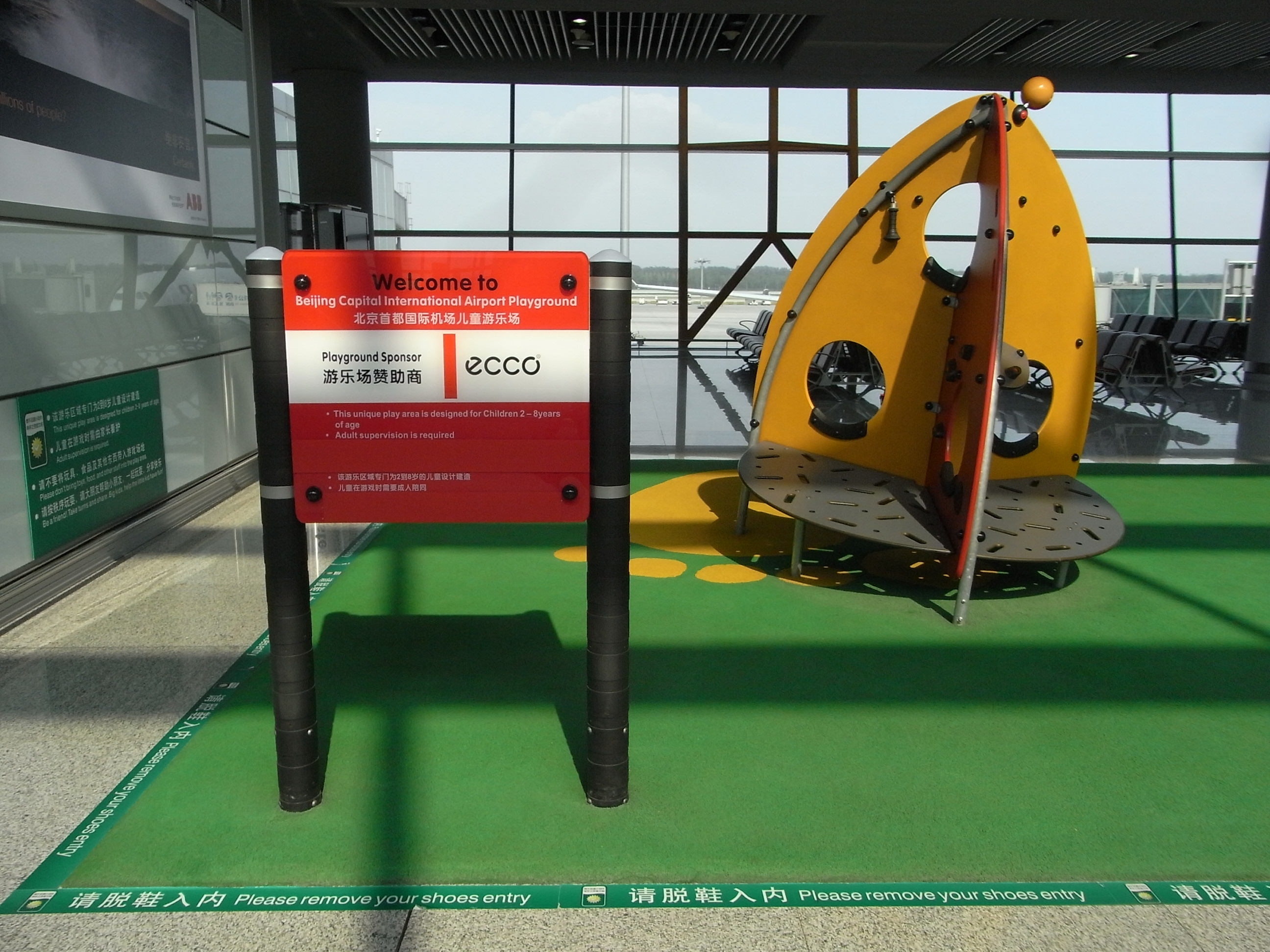 zh:2010年zh:8月北京 北京首都國際機場